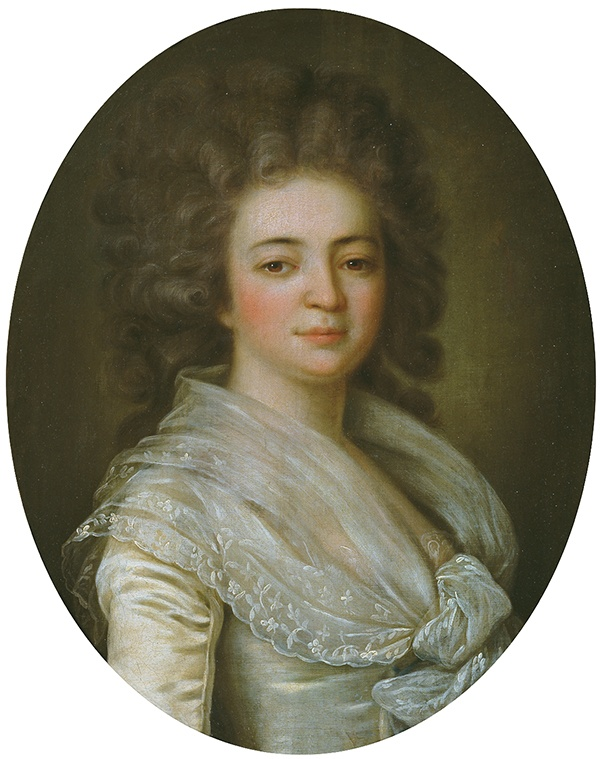 Екатерина Ивановна Соймонова, урож. Болтина (1756—1790)